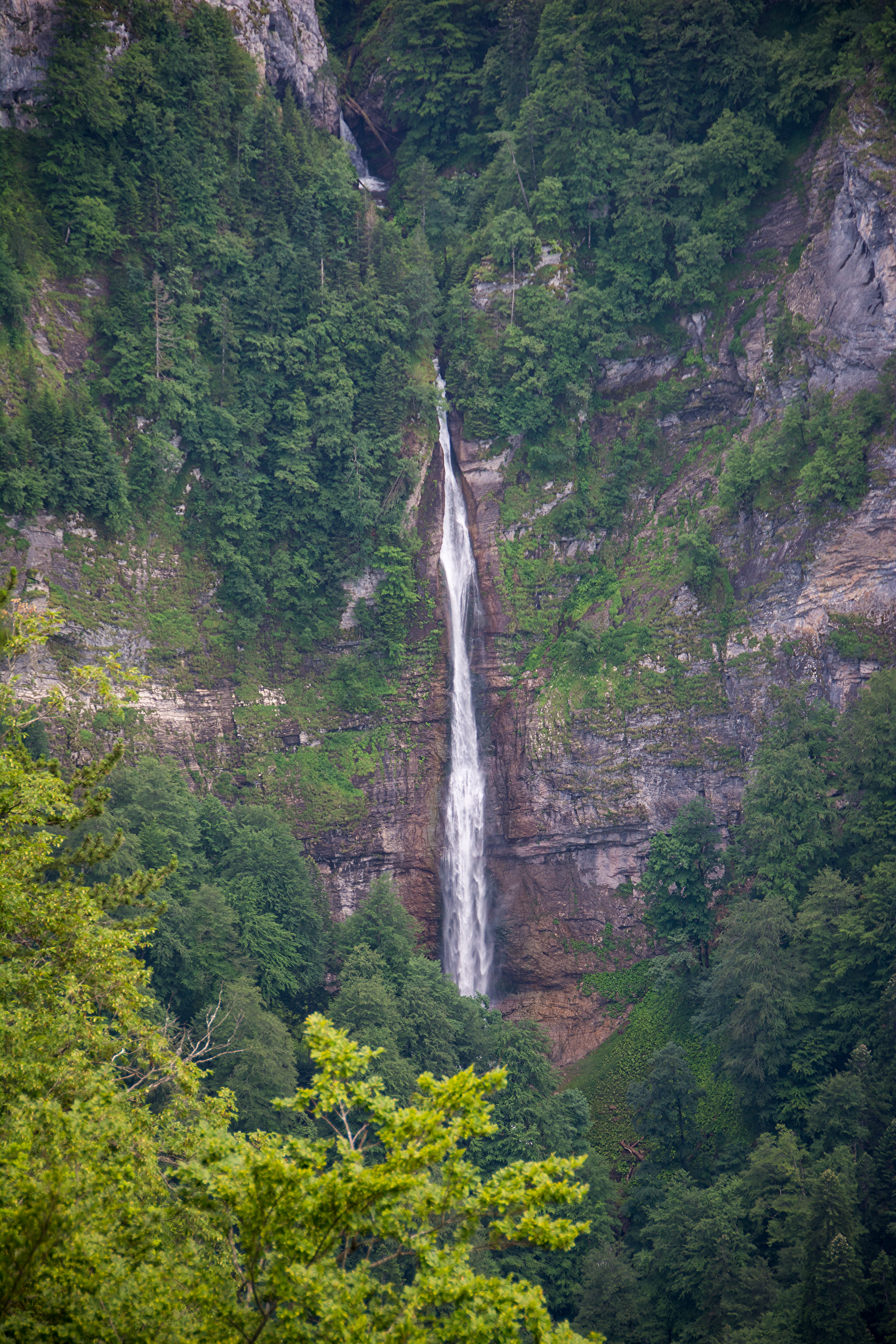 This image was uploaded as part of Trace of Soul 2018.